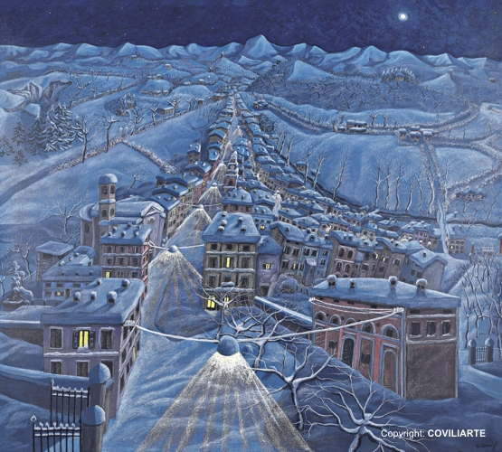 IL PAESE DORME E SOGNA, 1996/97 tecnica mista su tela cm 134 x 150